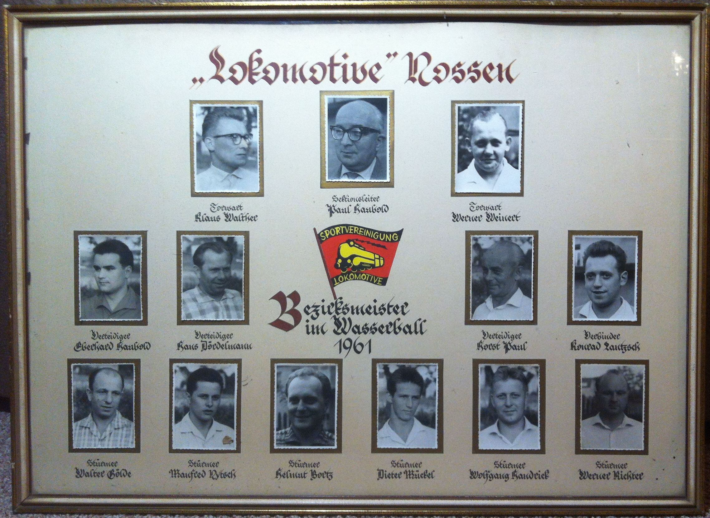 Nossner Bezirksmeistermannschaft im Wasserball 1961